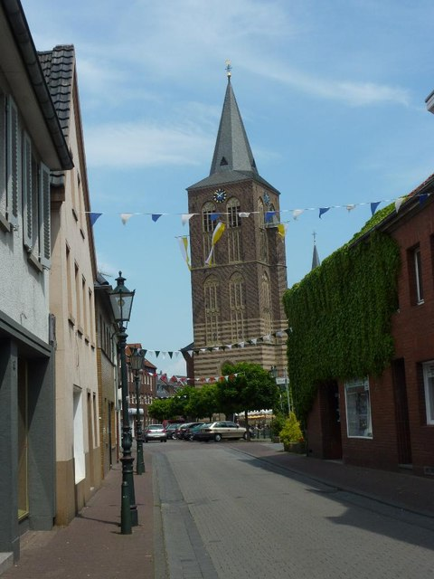 Korschenbroich. St. Andreas Kirche und Sebastianusstr.